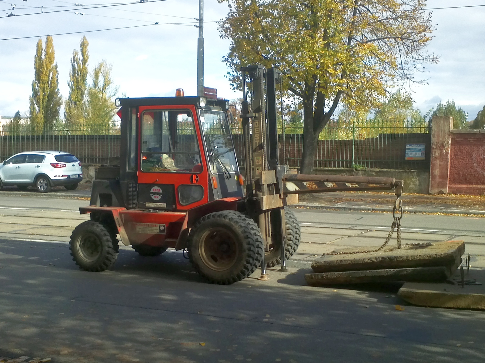 Vysokozdvižný vozík Desta v Brně.